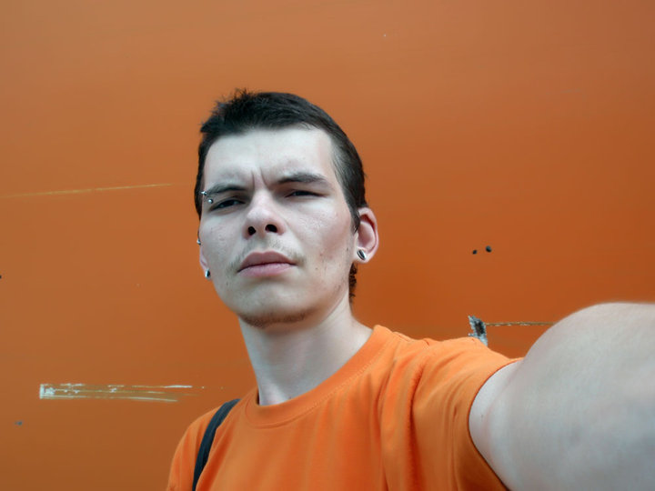 Автопортрет І. Стронґовського на тлі помаранчевої фури